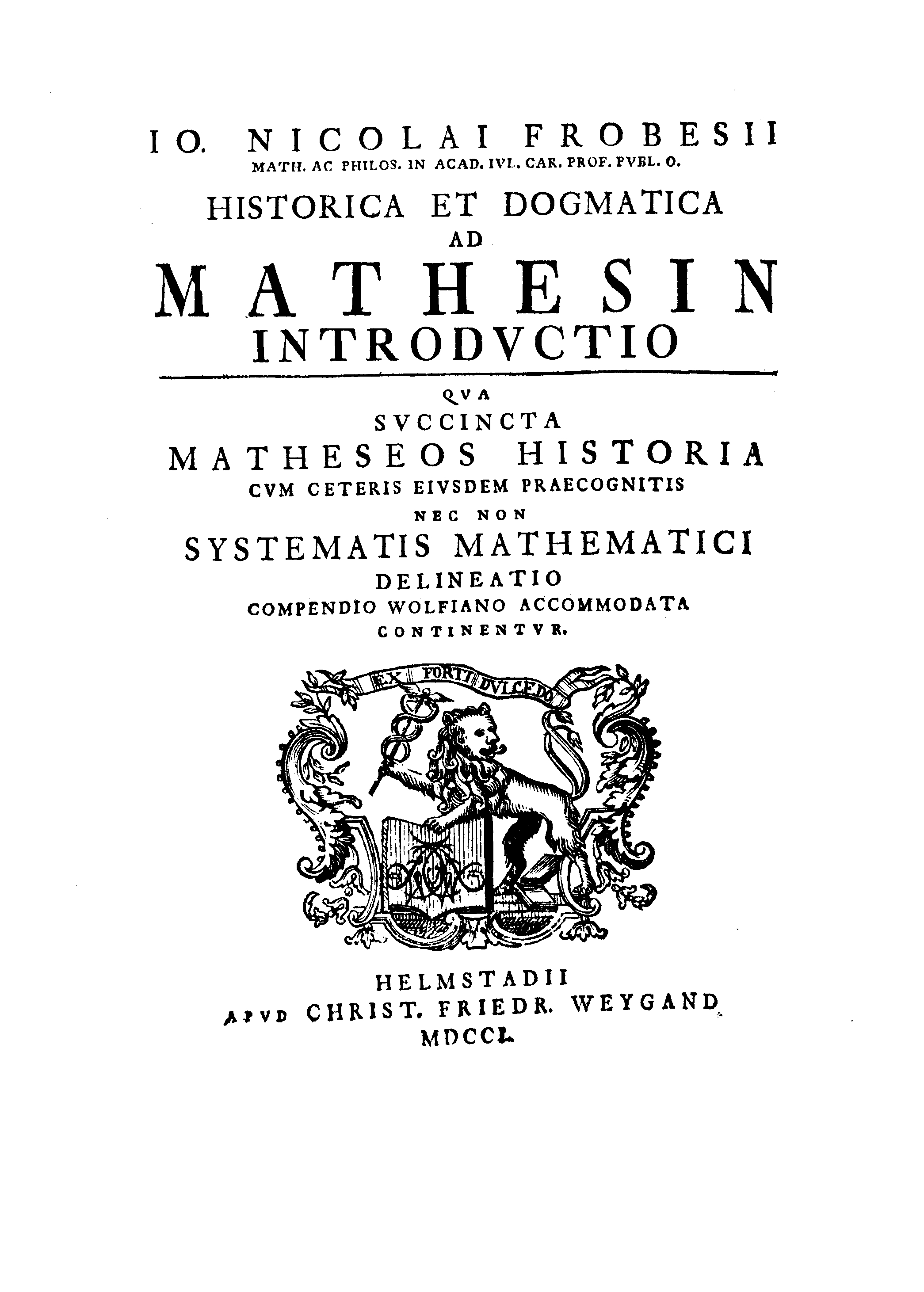 Frontespizio